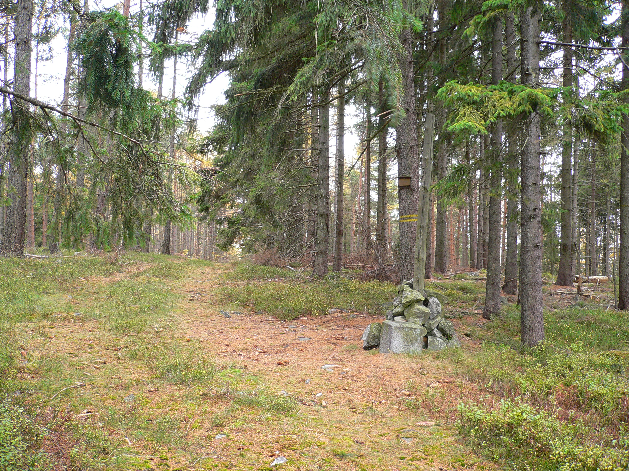 Temeno Peteráku (813 m) v Brdech